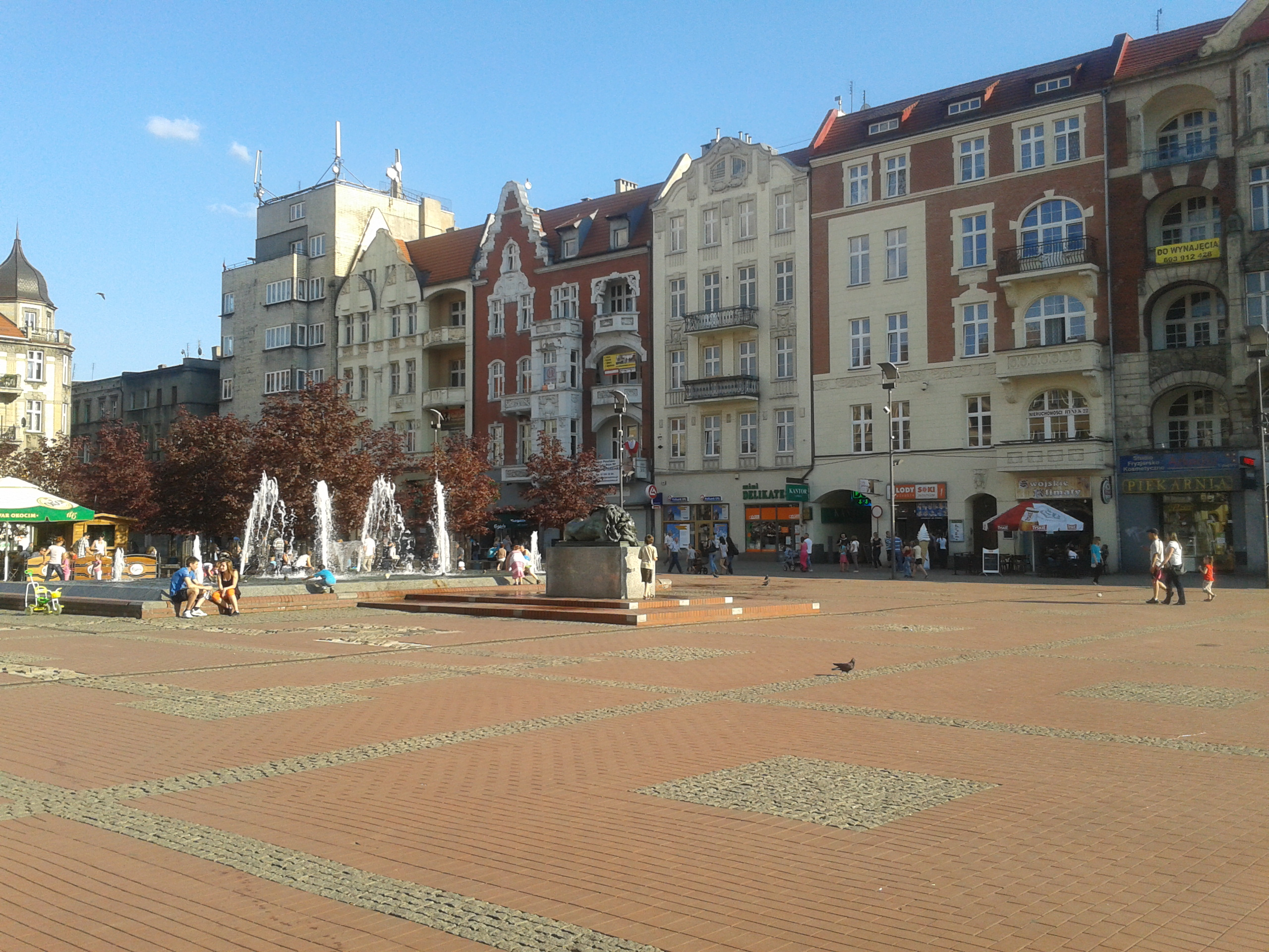 Rynek w Bytomiu